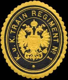 Sealing stamp Title: K.u.K. Train Regiment No. 1 Description: Eisenbahn, gelb, schwarz, geprägt Place: size: 4x4 cm